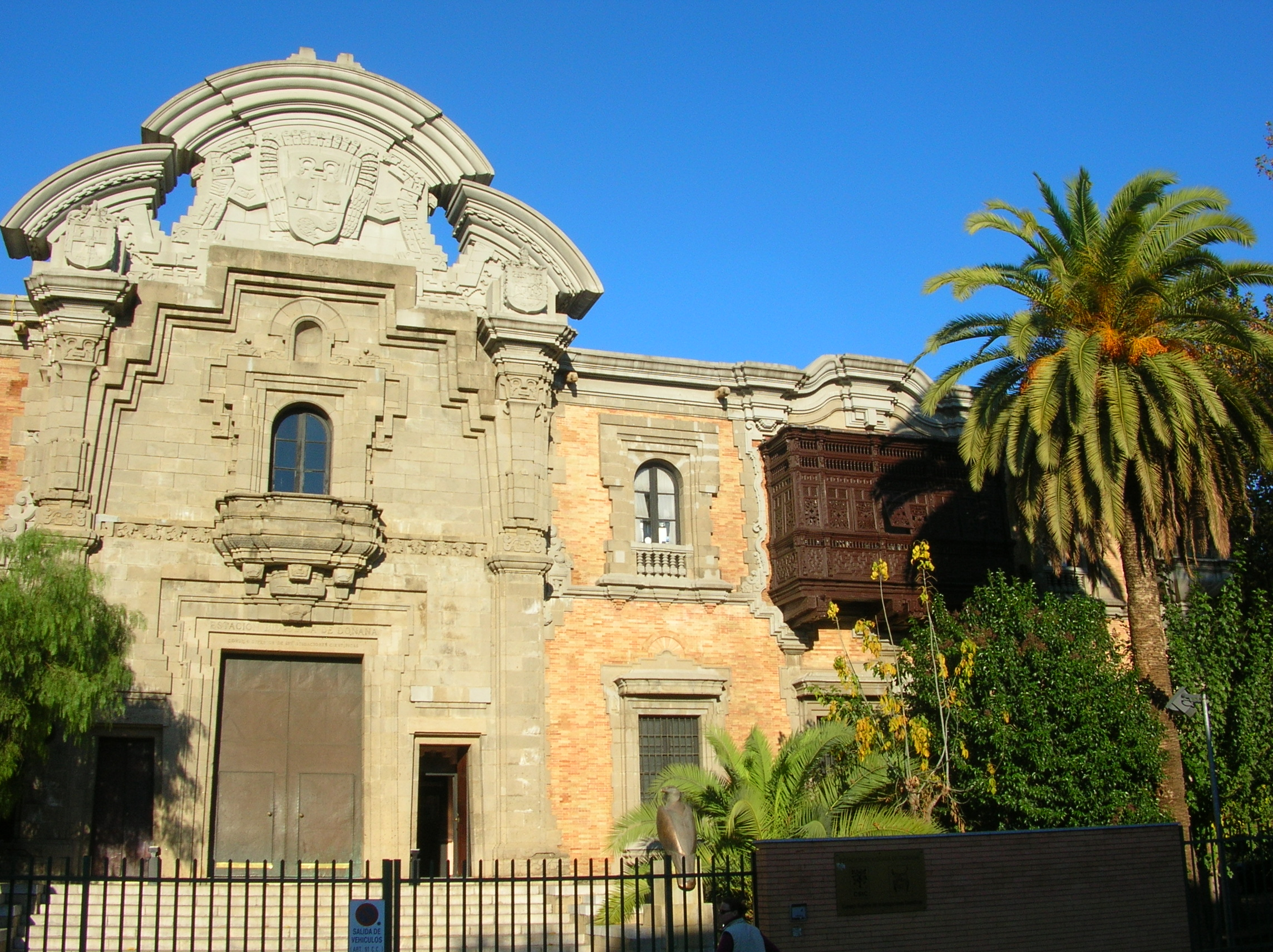 Pavillon du Pérou de l'expo ibéro-américaine de Séville de 1929